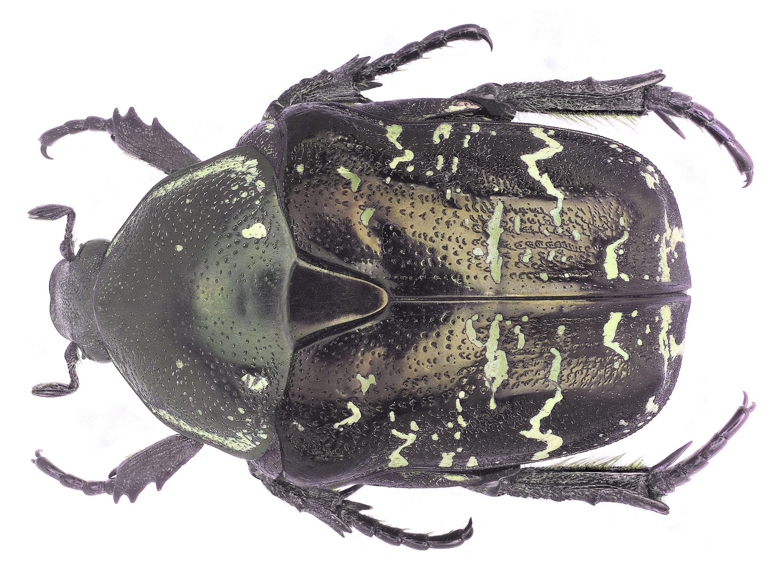 Protaetia brevitarsis brevitarsis Lewis, 1879 Familie: Scarabaeidae Grösse: 17-20 mm Verbreitung: China Fundort: China, Hupeh Prov., Dabie Shan det. U.Schmidt Foto: U.Schmidt, 2007